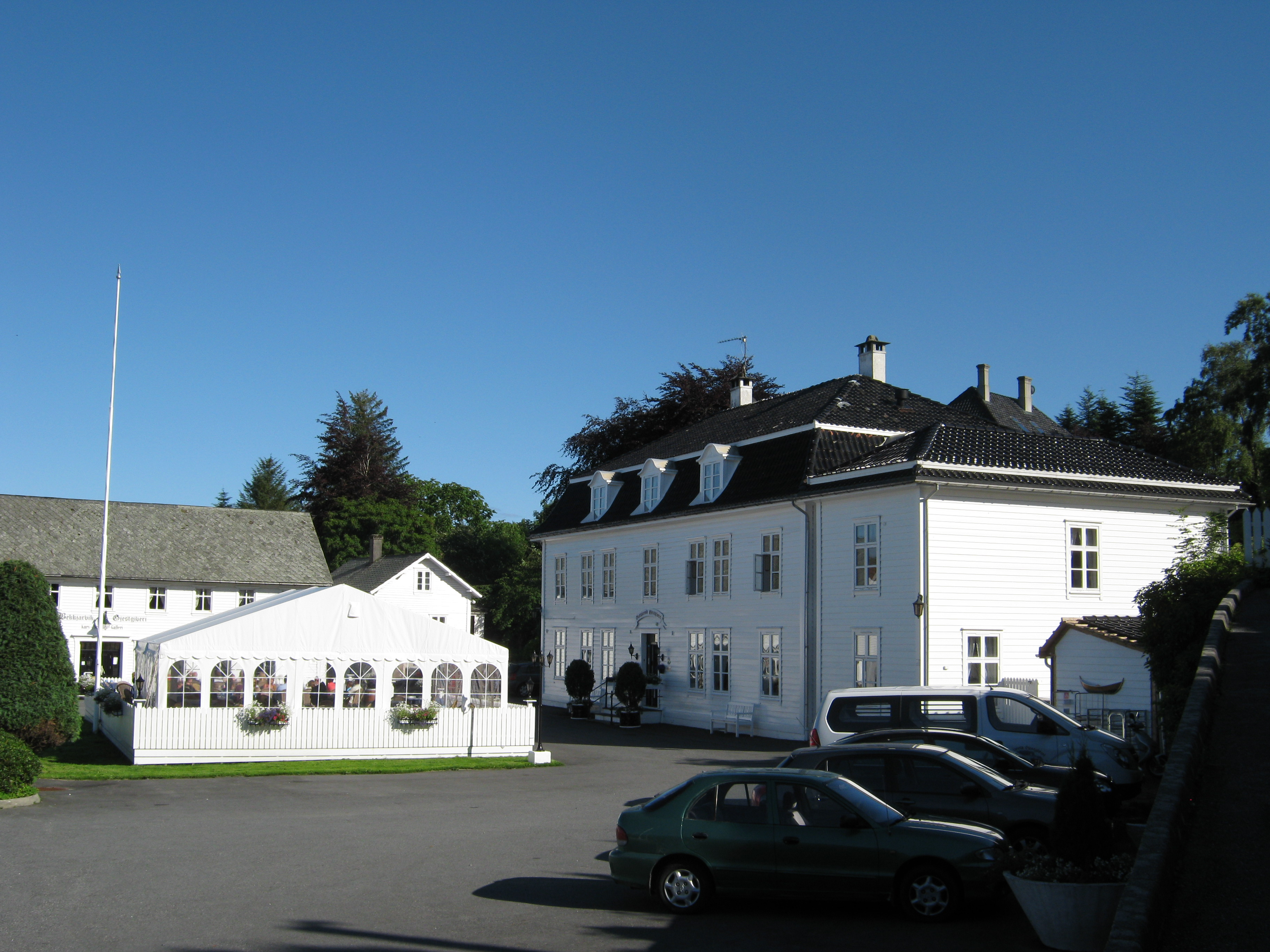 Bekkjarvik Gjestgiveri på Bekkjarvik, Austevoll